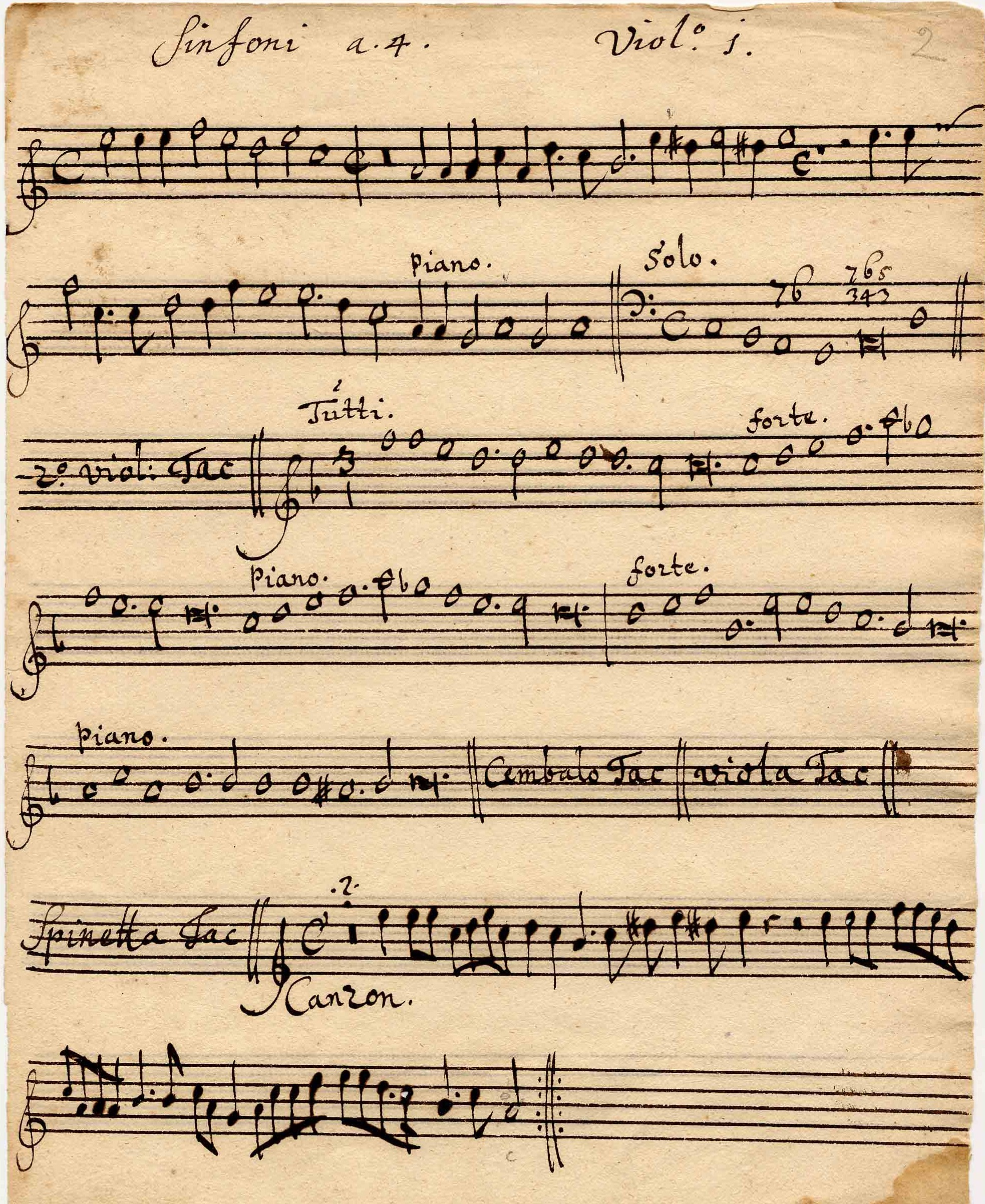 Une page manuscrite d'une œuvre de Gustav Düben datée des environs de 1654. Partie de violon d'une Sinfonia a 4, du fonds Düben d'Uppsala.